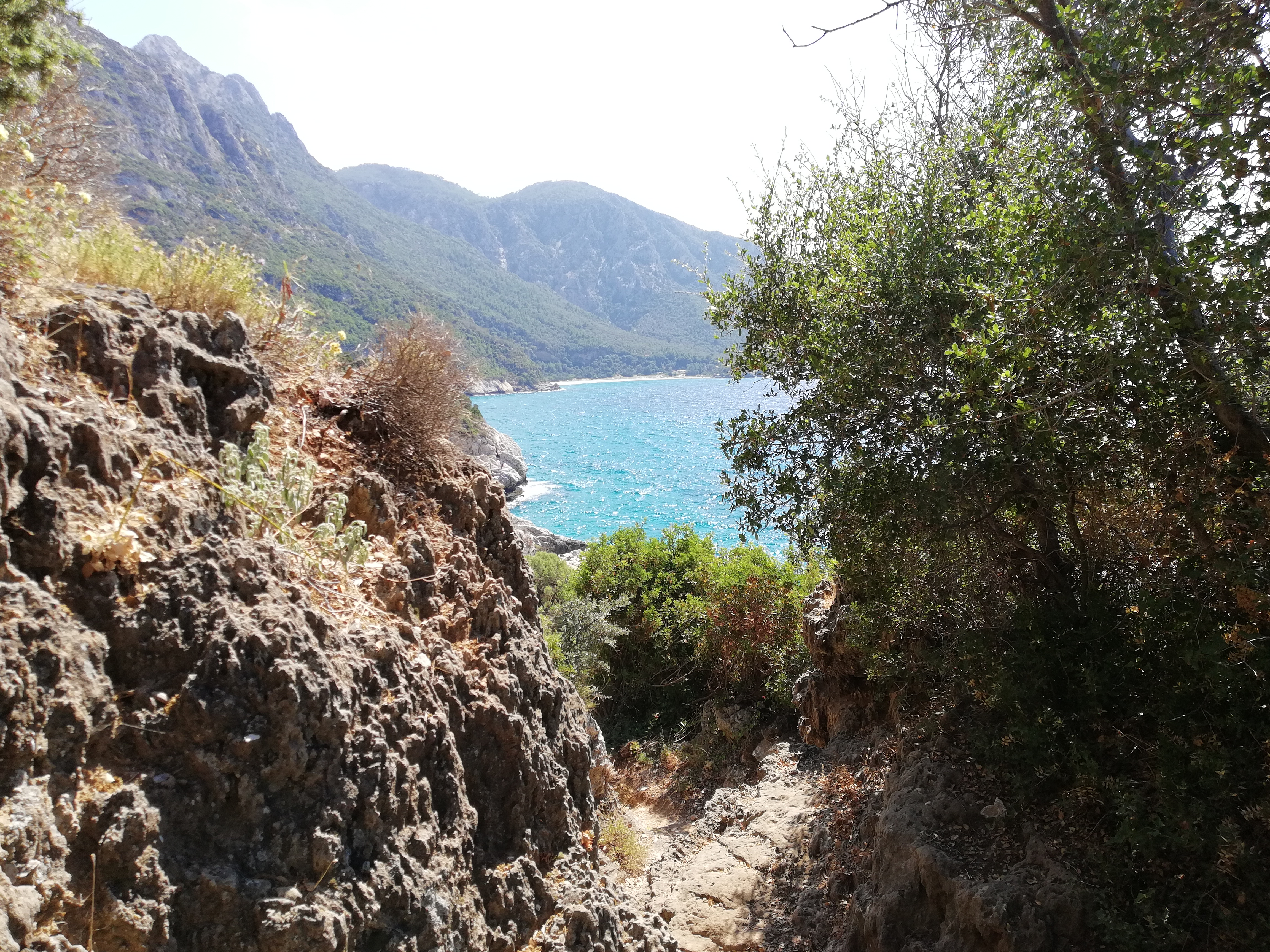 Είναι μια απο τις πιο όμορφες θέες του νησιού This is a photography of Natura 2000 protected area with ID GR4120003